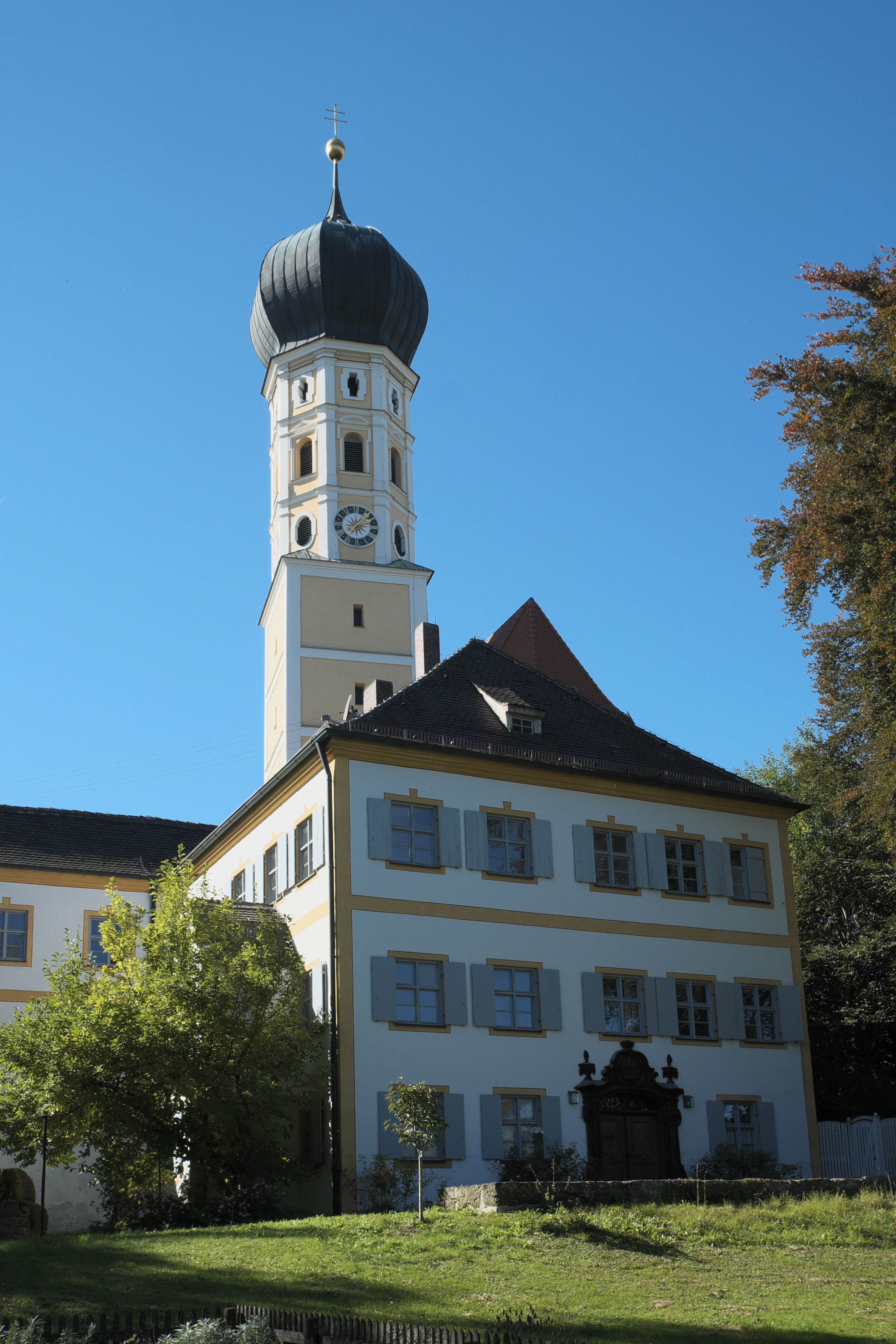 Katholische Pfarrkirche Mariä Himmelfahrt in Walleshausen, einem Ortsteil von Geltendorf im oberbayerischen Landkreis Landsberg am Lech (Bayern/Deutschland), im Vordergrund der Pfarrhof